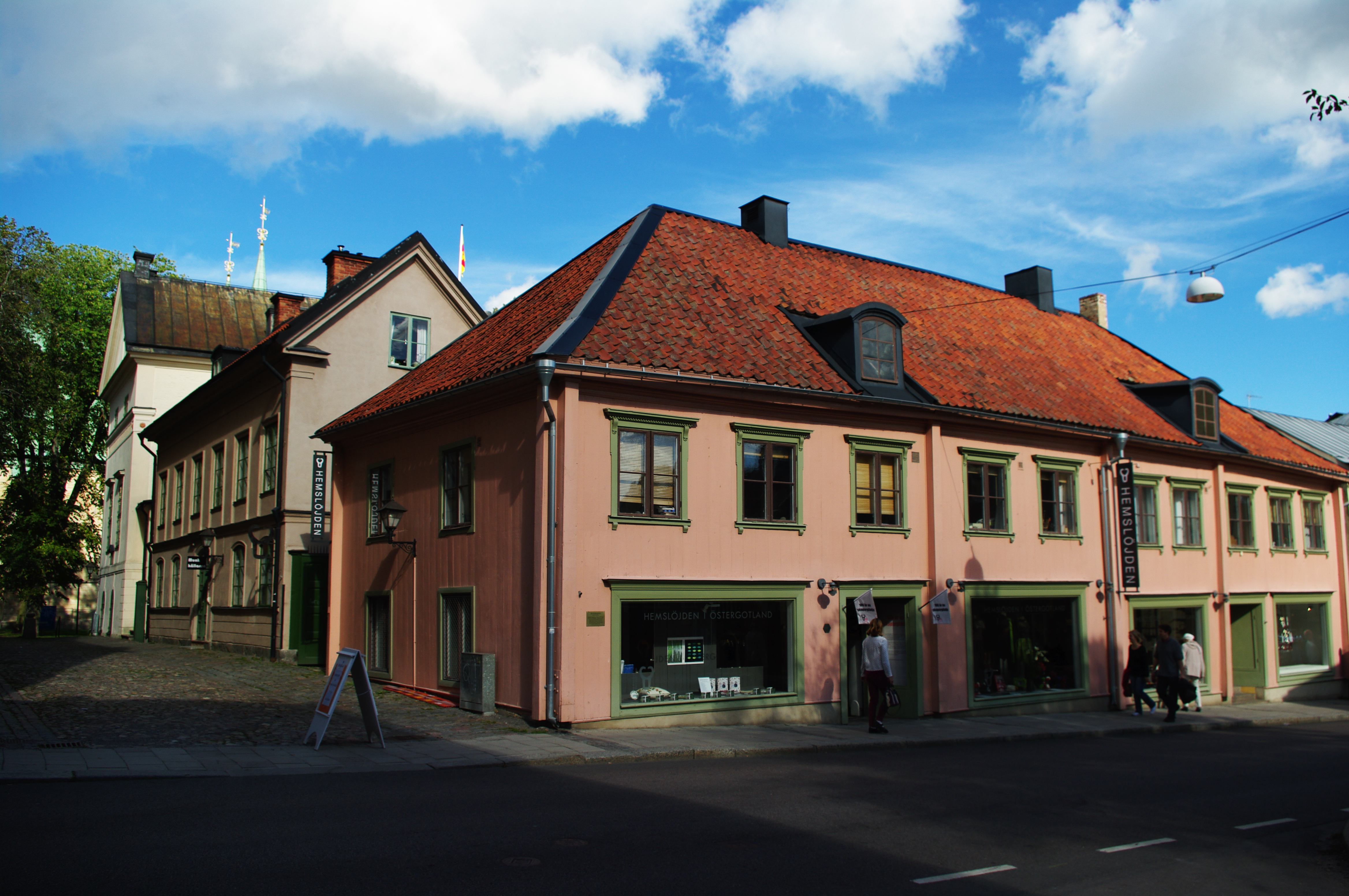 Vy från Storgatan